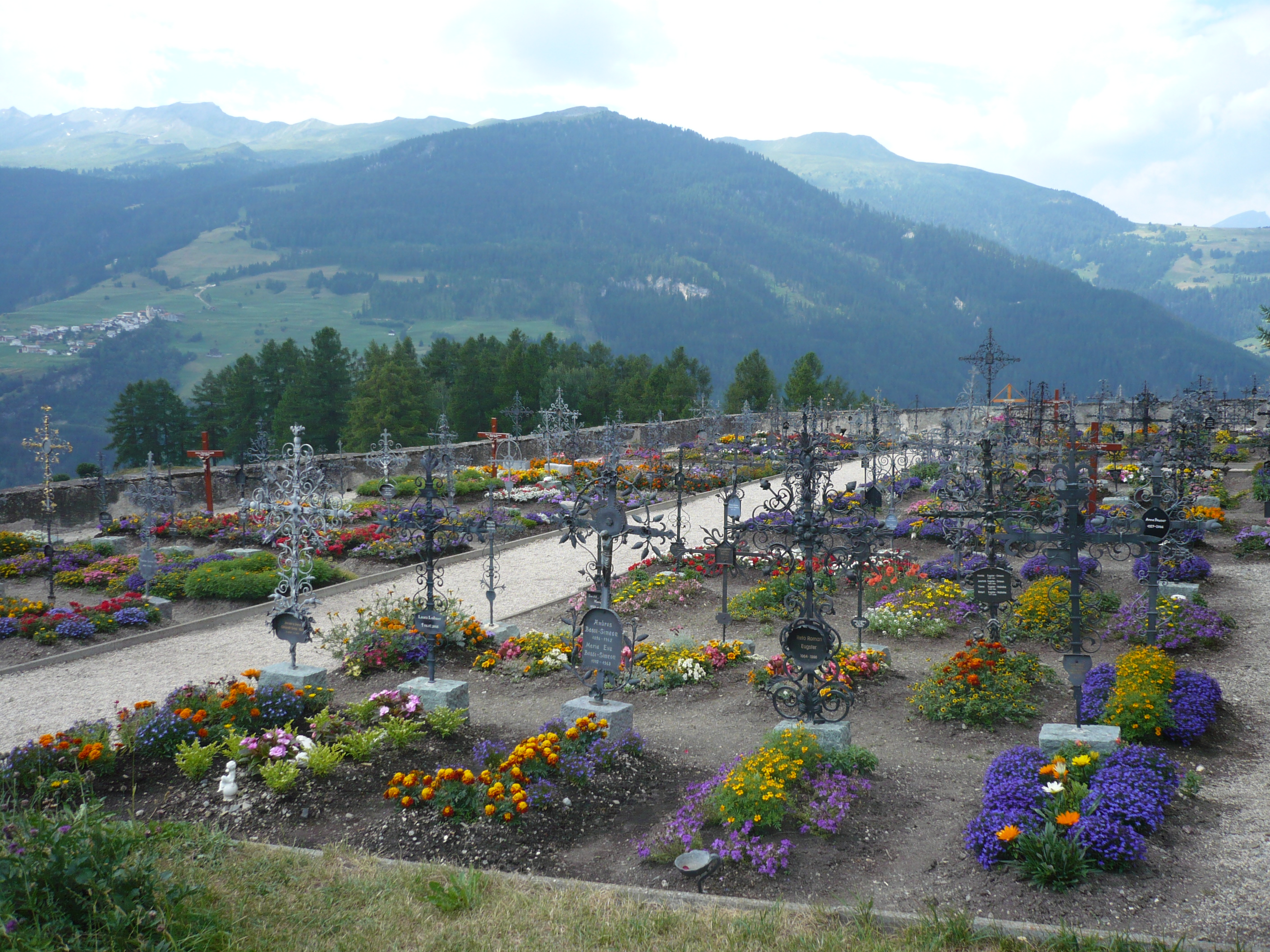 Kirche St. Maria Lantsch/Lenz Friedhof